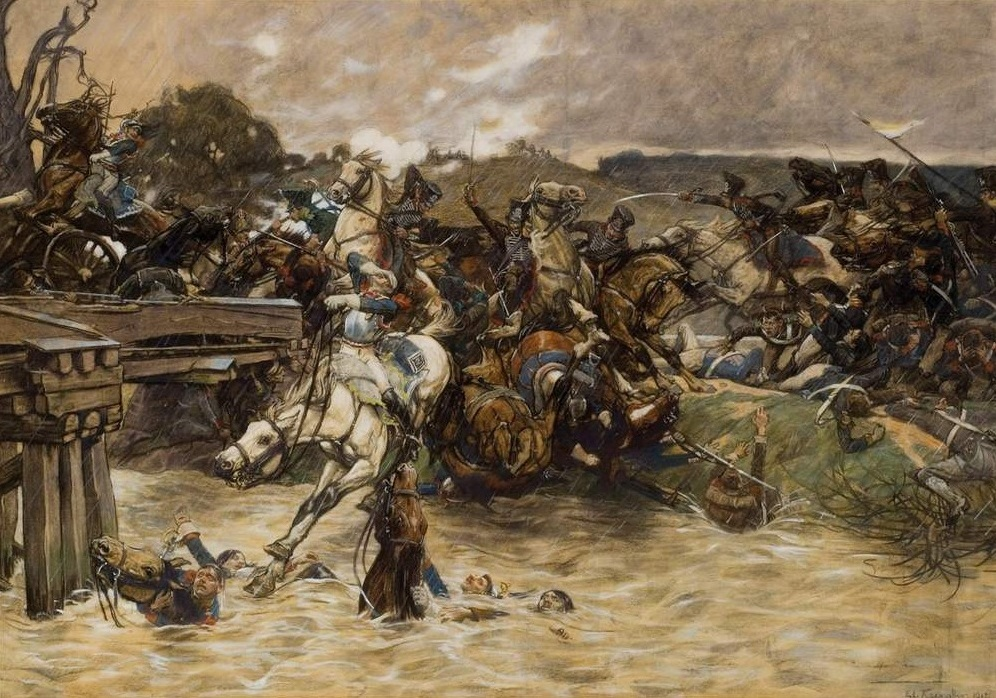 Schlacht an der Katzbach 1813, Gemälde von Eduard Kaempffer